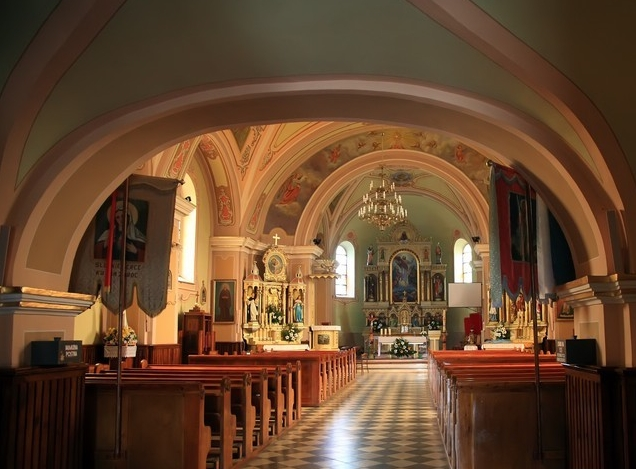 Kościół parafialny Przemienienia Pańskiego w Jabłonce, z lat 1802–1817 (województwo małopolskie)